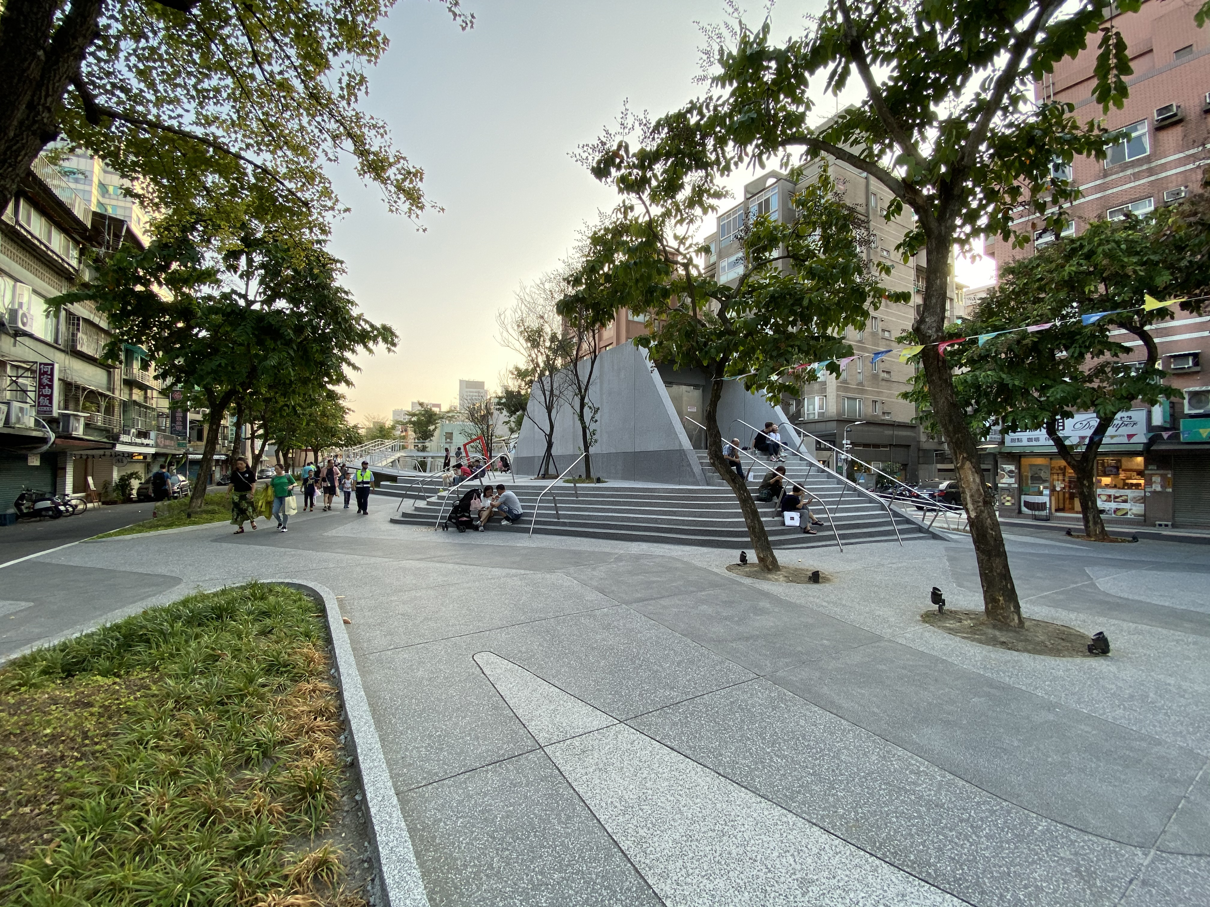 Zhongshan Shuanglian Linear Park